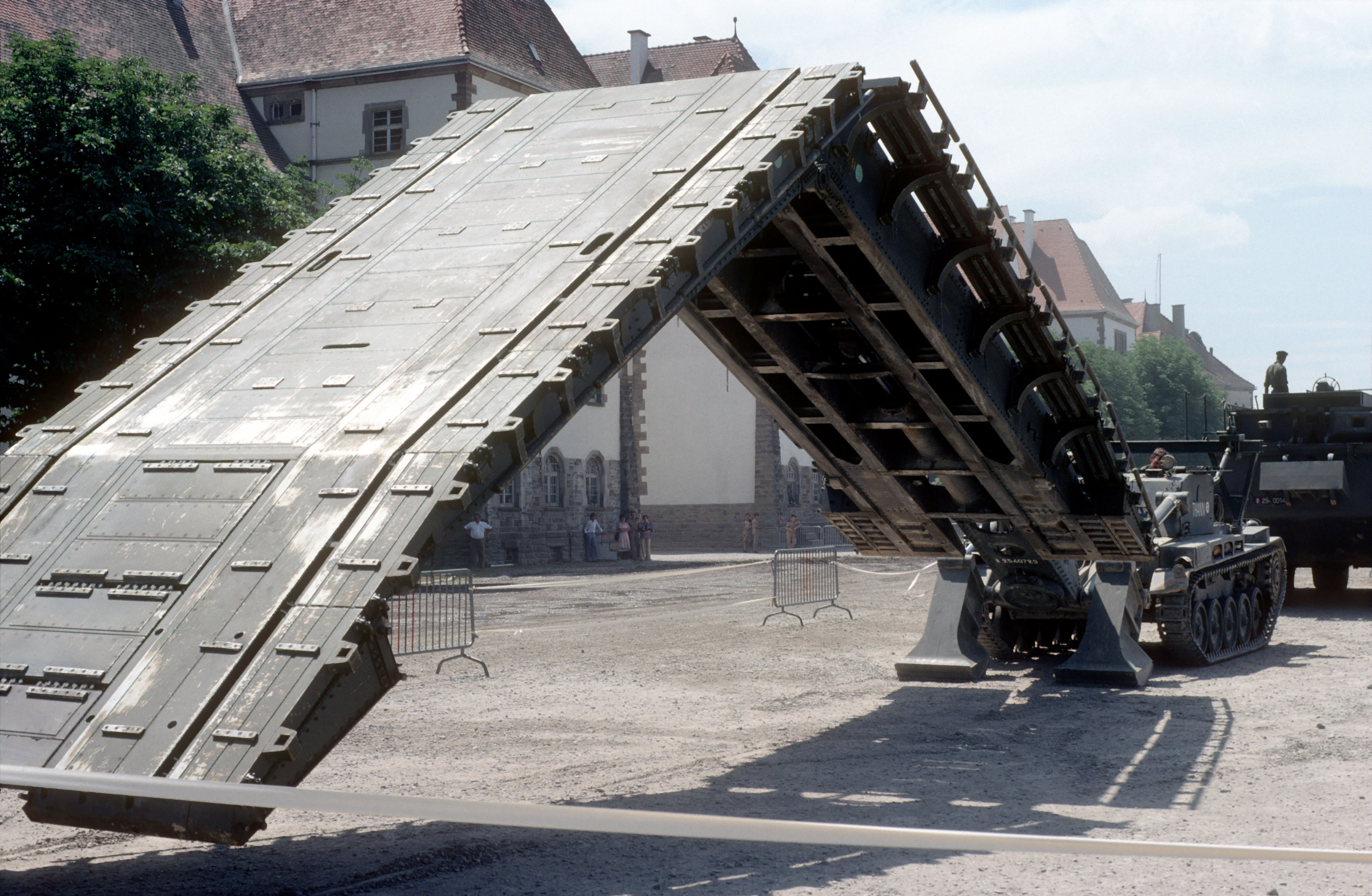 Portes Ouvertes à la caserne Abbatucci. AMX 13 H Poseur de pont. Pilote: 2e SM F. Stuiss. 9/5.